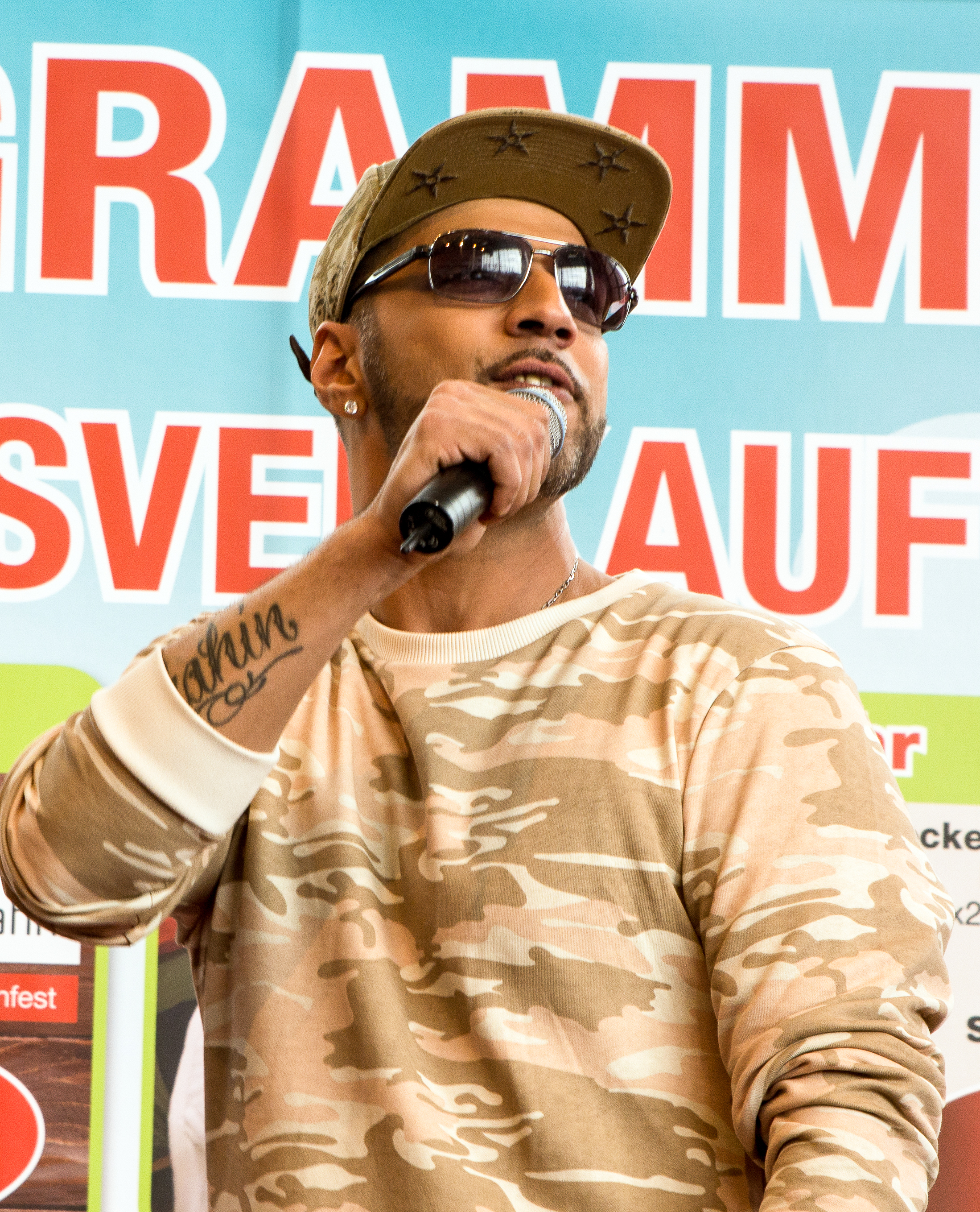 Mehrzad Marashi Live in HH-Halstenbek